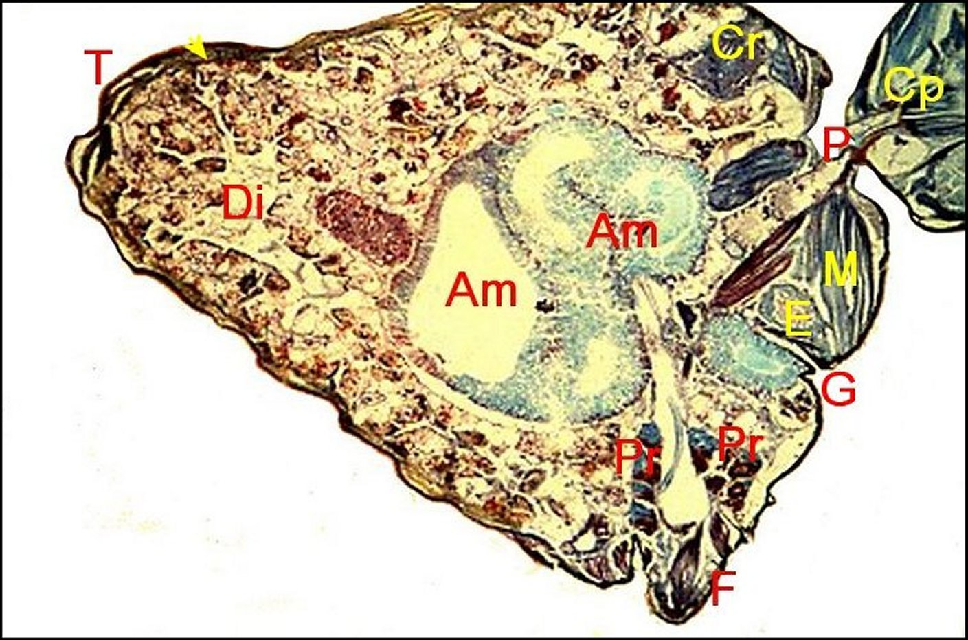 Coupe longitudinale d'abdomen d' Argyrodes argentatus avec des glandes à soie